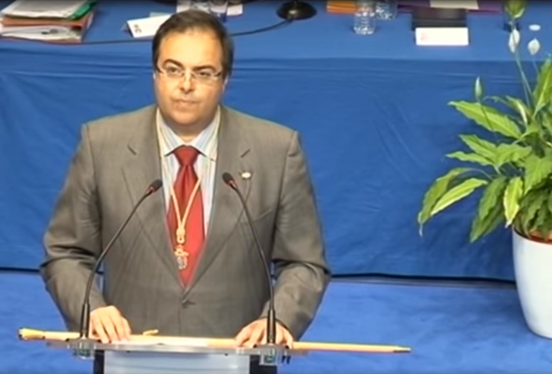 Investidura de Santiago Llorente, alcalde de Leganés el 13 de junio de 2015.